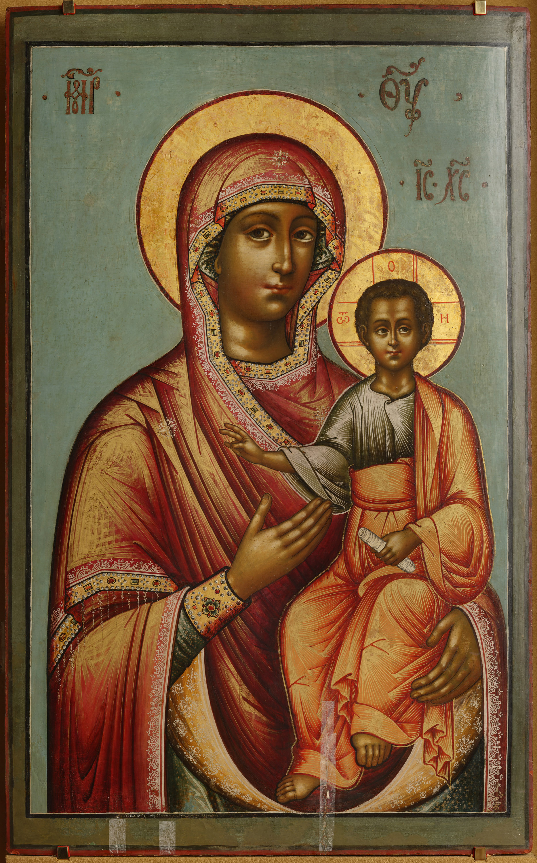 Икона «Богоматерь Смоленская», автор: Рокитин Яков Сергиев, Государственный музей истории религии Идентификационный номер КП-35980 120 х 73,5 см